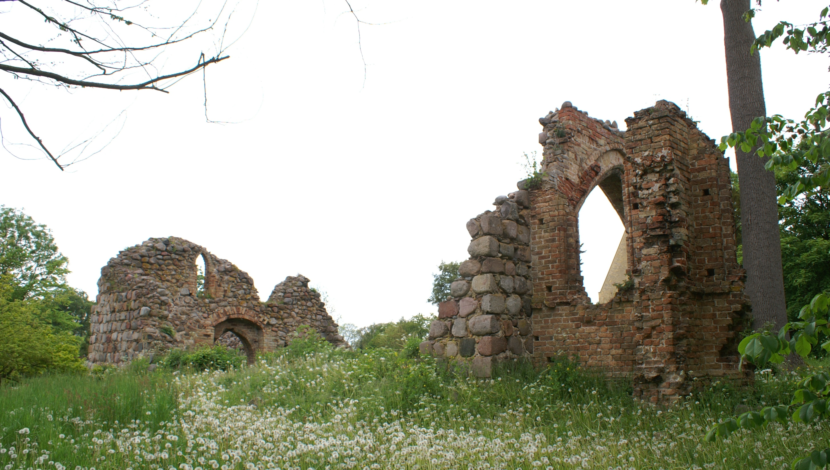 Karlsburg (Landkreis Ostvorpommern) - Ortsteil Steinfurth - Kirchenruine